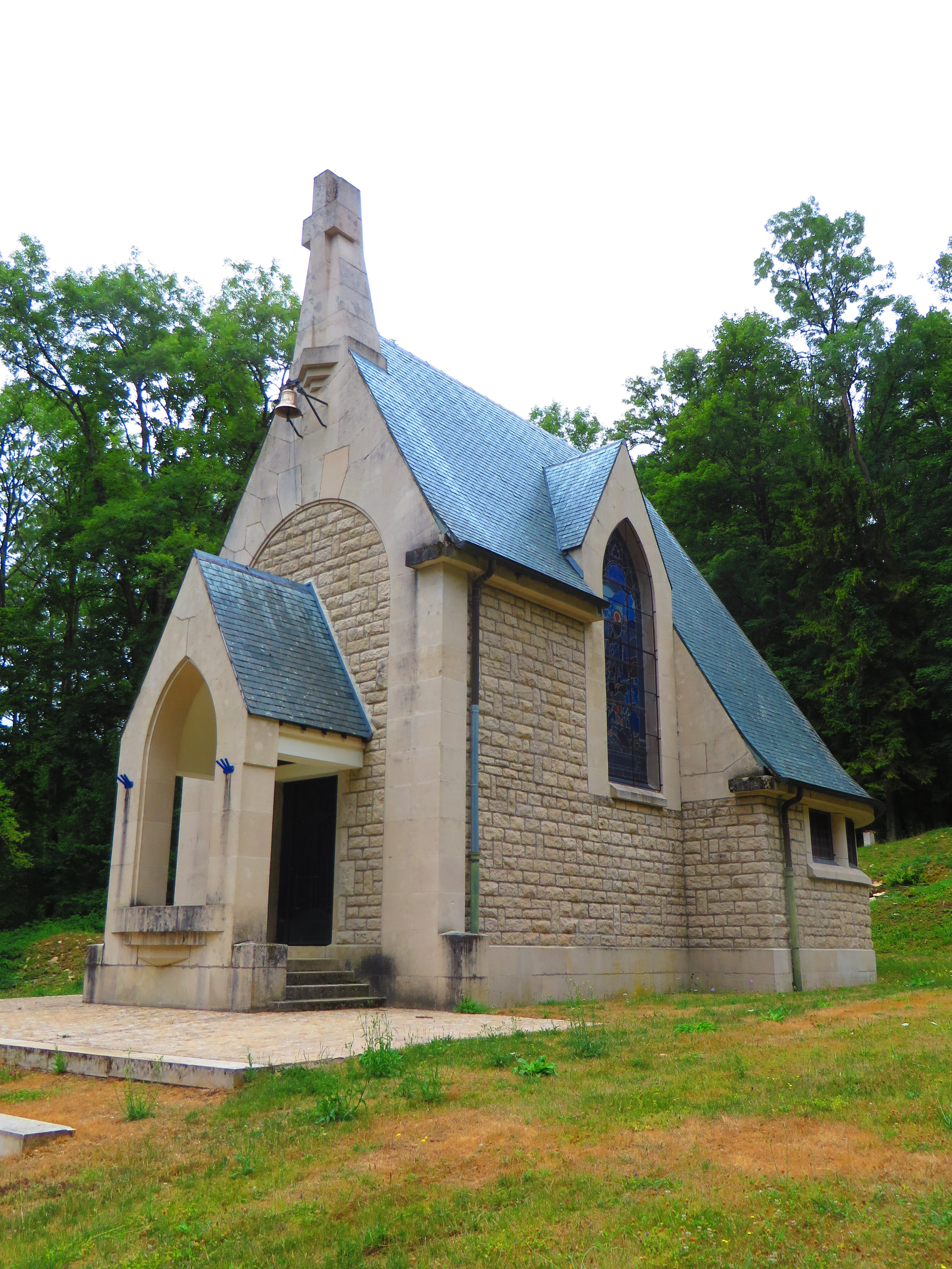 Beaumont-en-Verdunois Chapelle Saint-Maurice